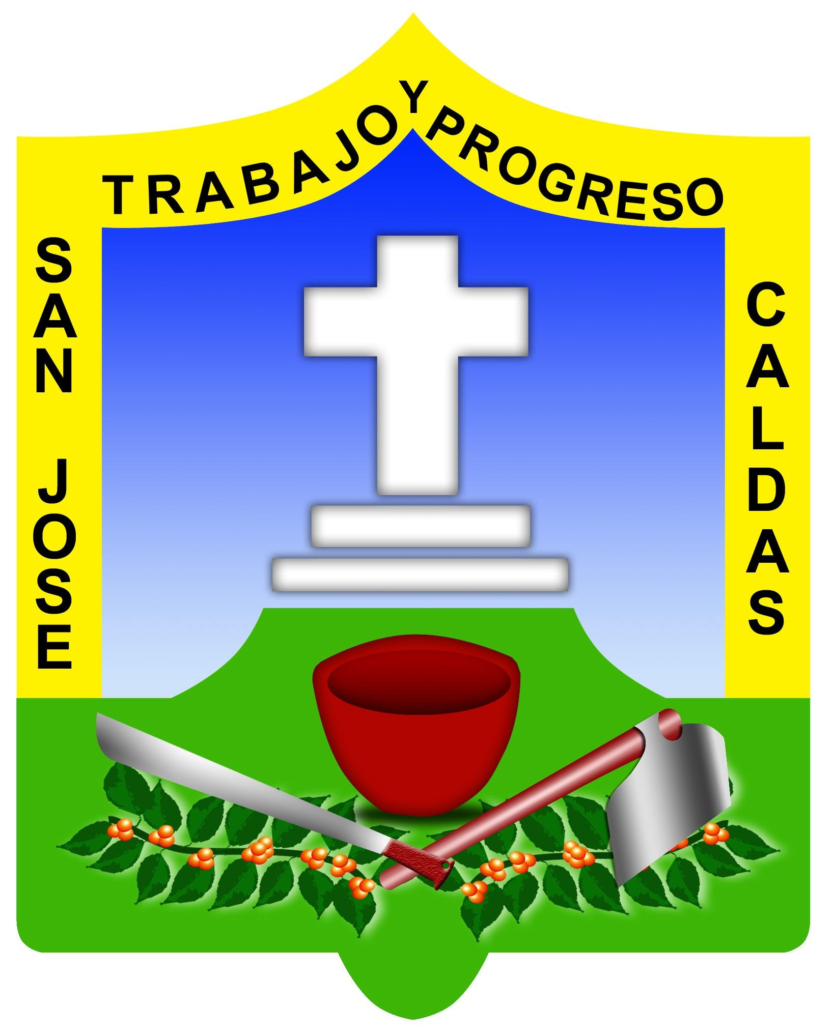 Escudo San José Caldas